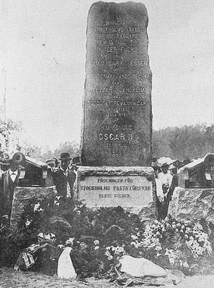 Ceremoni vid Skogsömonumentet